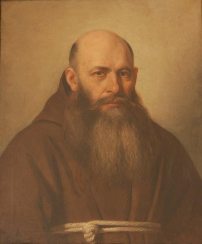 Beniamin Szymański, prowincjał kapucynów, olej na płótnie, Antoni Karol Kolberg ok. 1852; w zbiorach Wyższego Seminarium Duchownego Towarzystwa Salezjańskiego w Lądzie nad Wartą